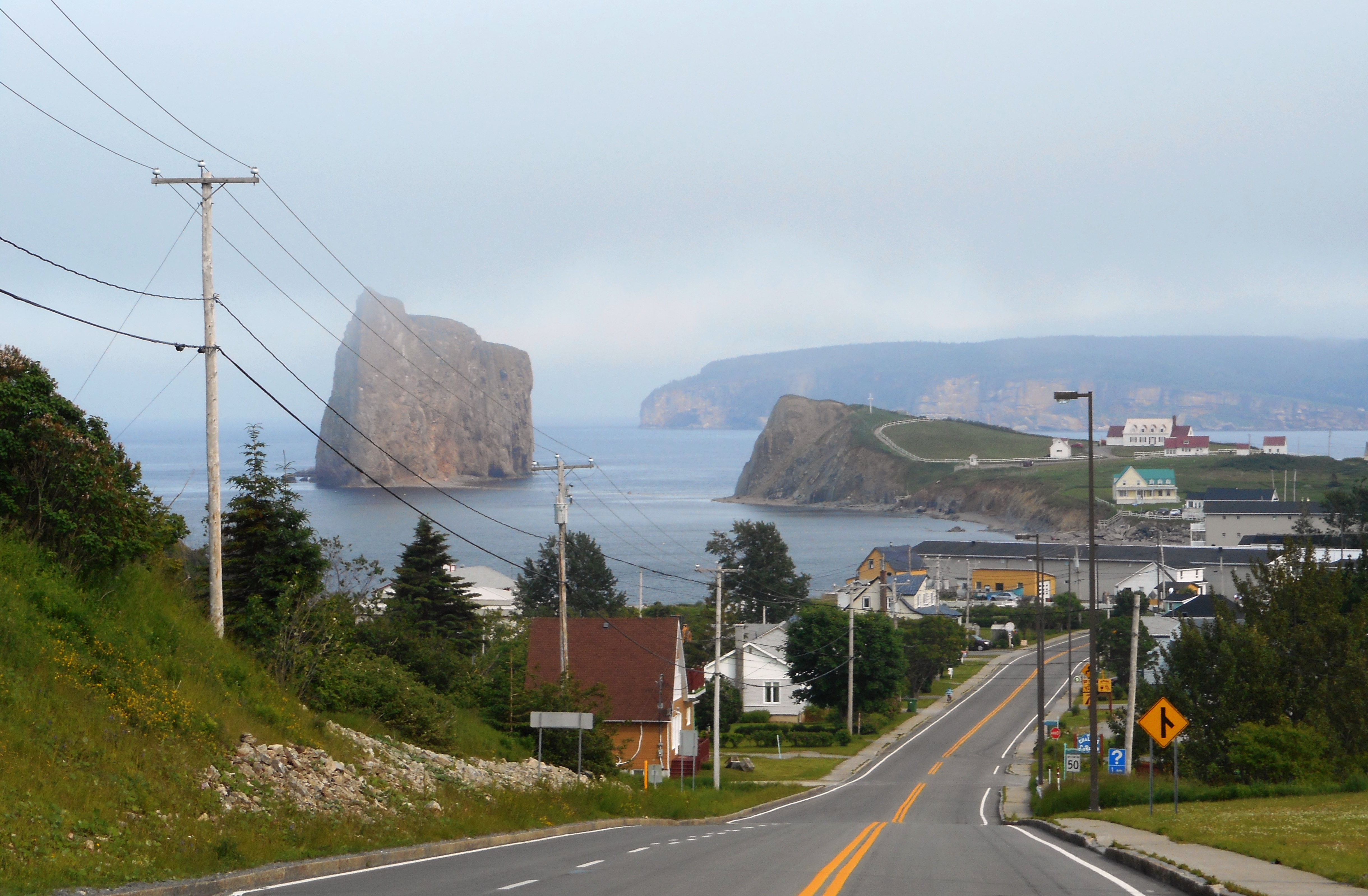 Le Rocher Percé qui apparaît, de la route 132, près de l'Anse du Nord